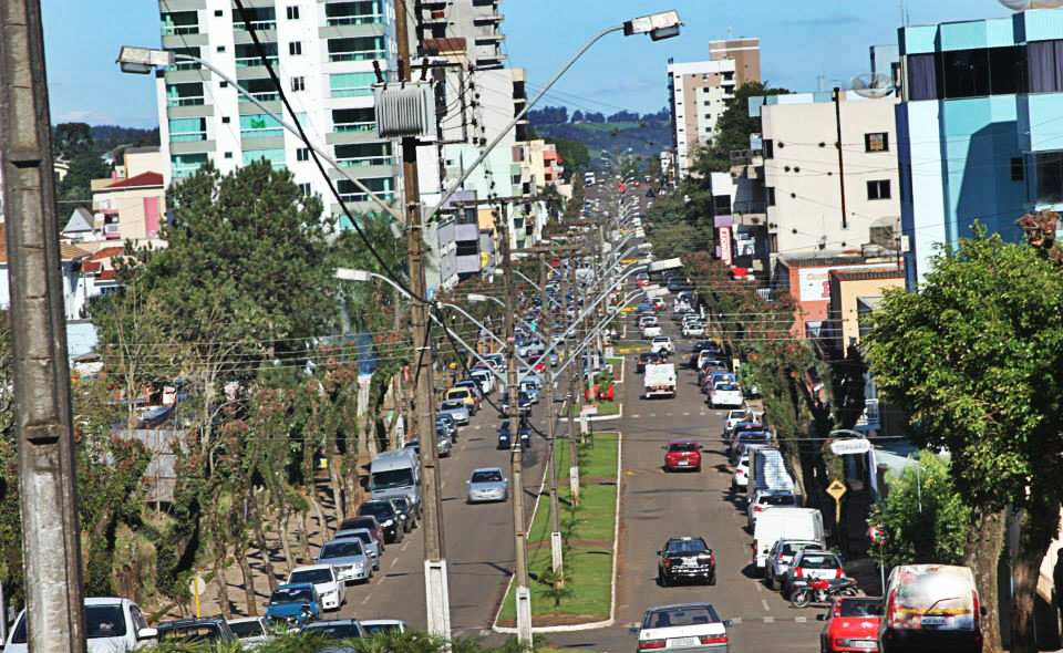 avenida central